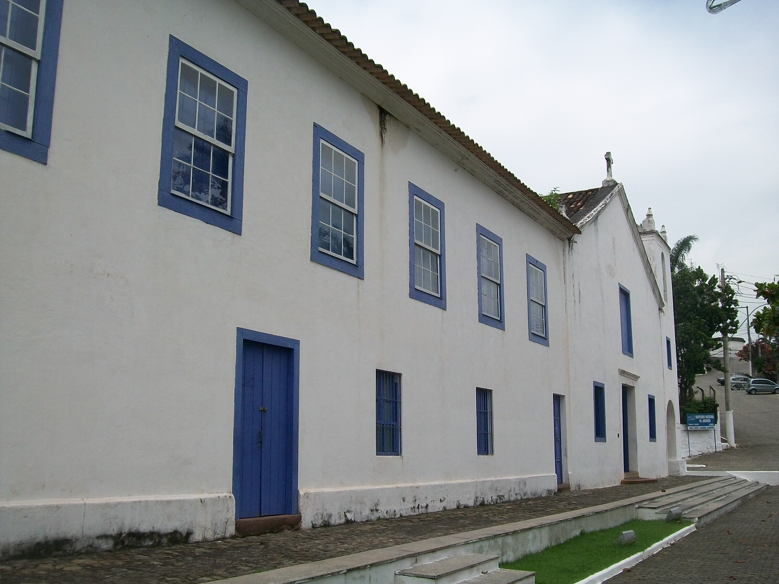 Anchieta - ES